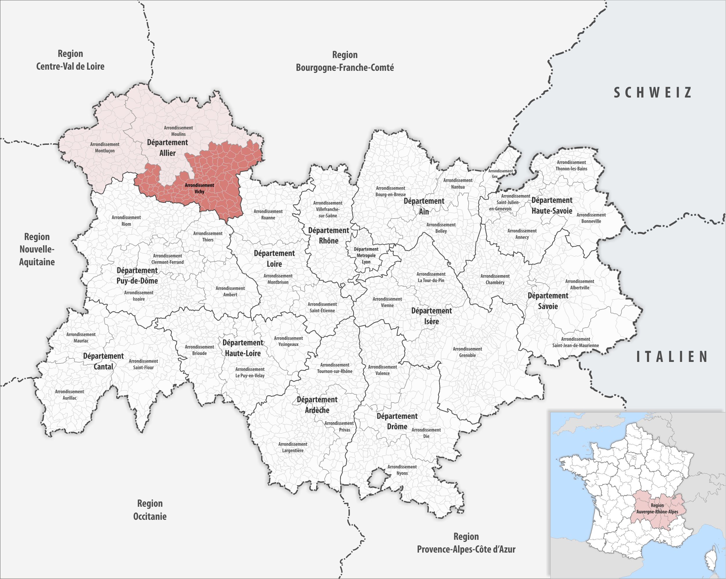 Lage des Arrondissements Vichy